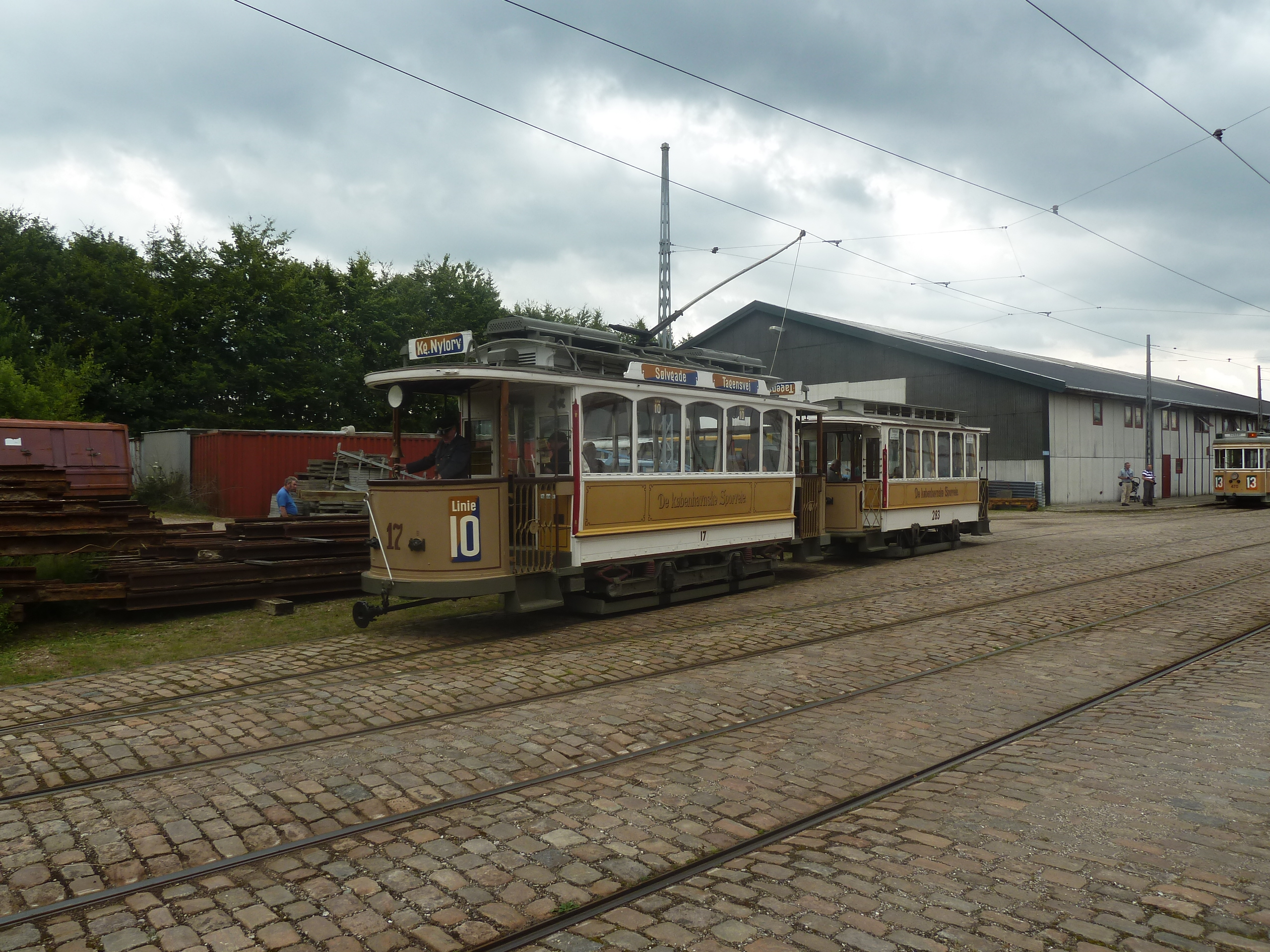 Old trams from Copenhagen, DKS 17+283, Sporvejsmuseet Skjoldenæsholm in Denmark.